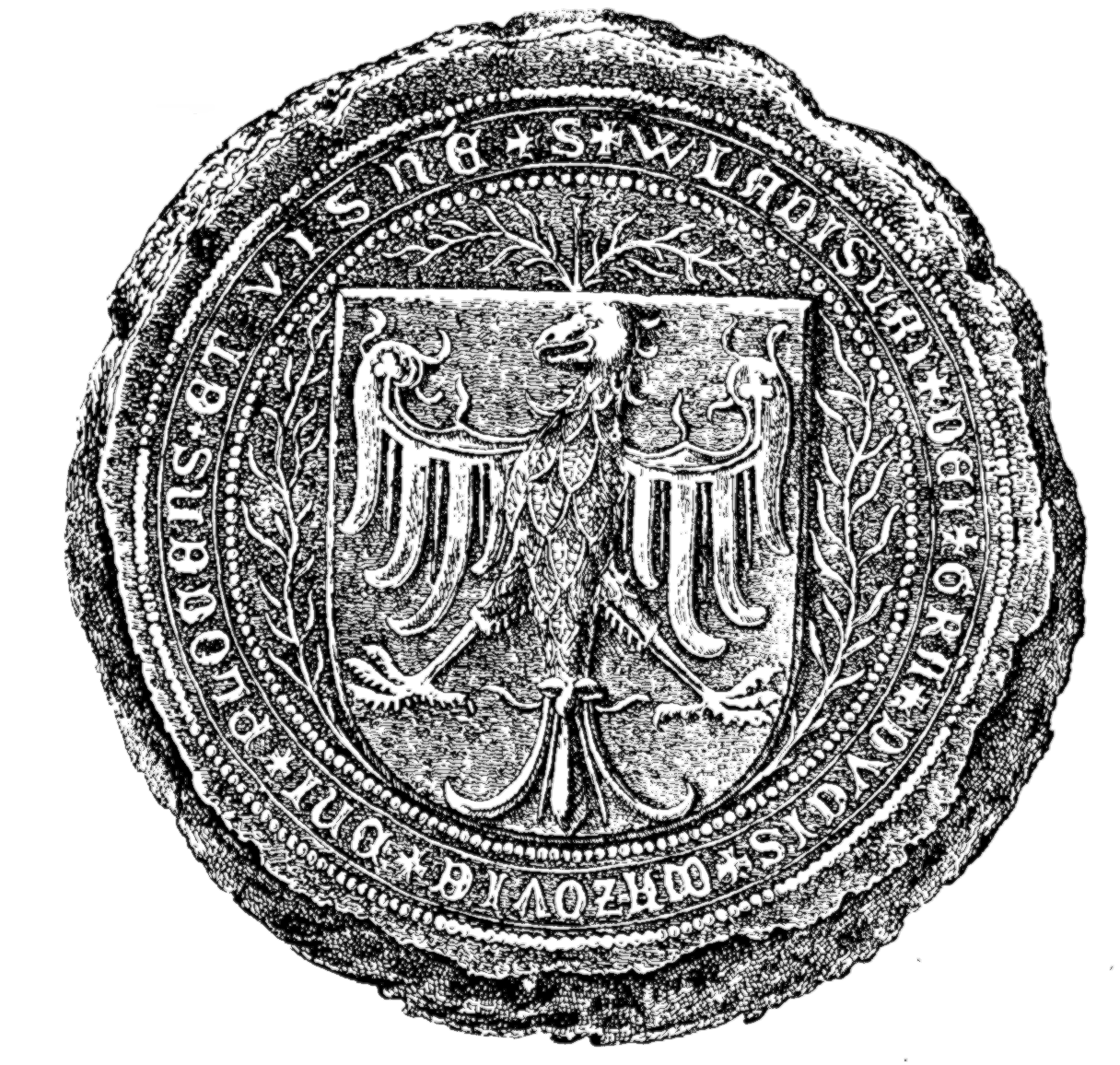 Władysław I Płocki seal